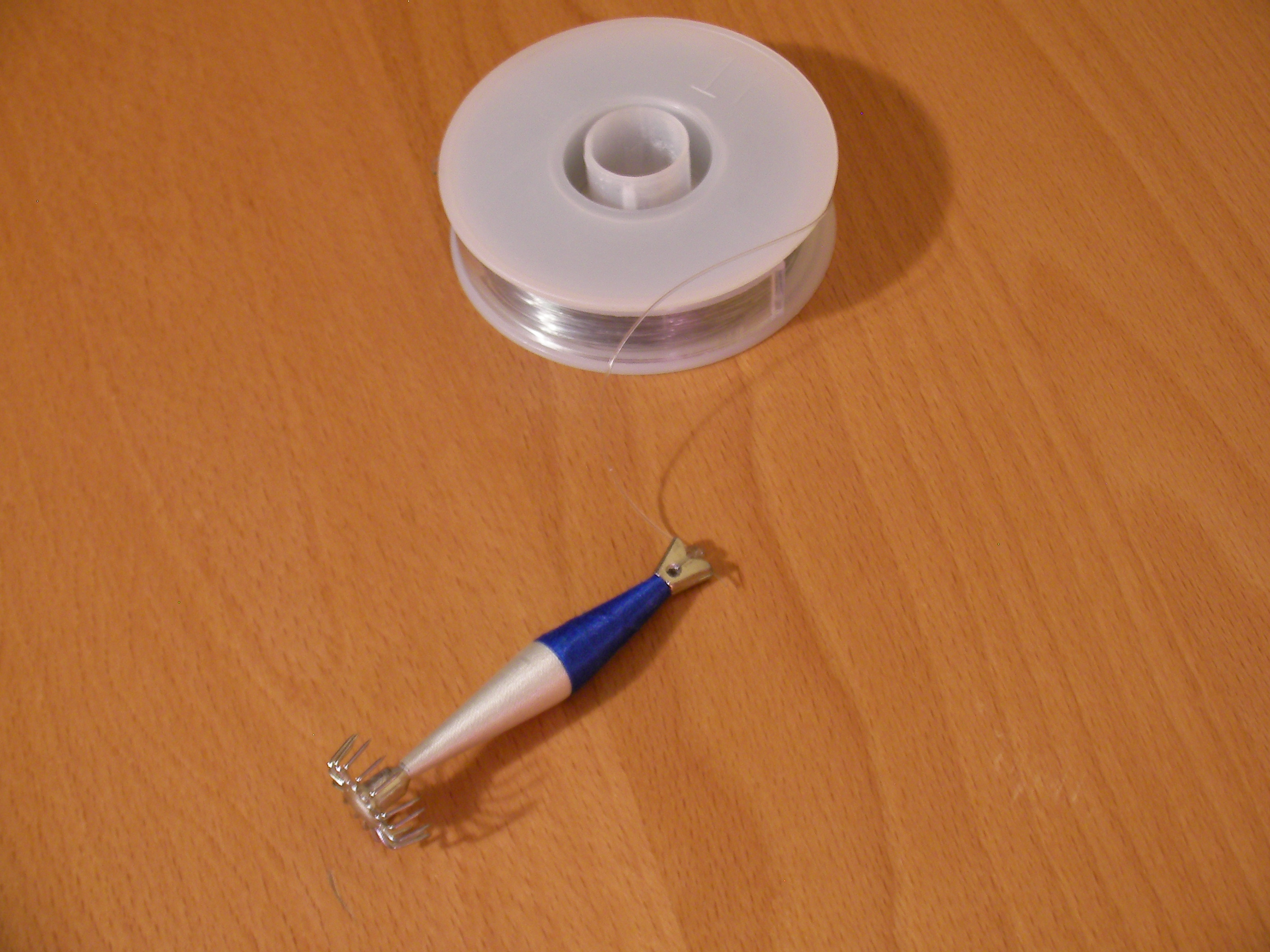 Poteira e tanza para a pesca de lulas